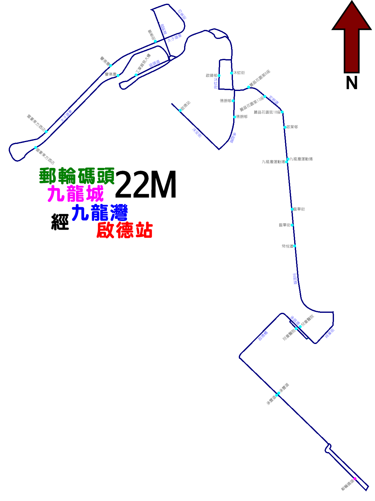 城巴22M線的走線圖